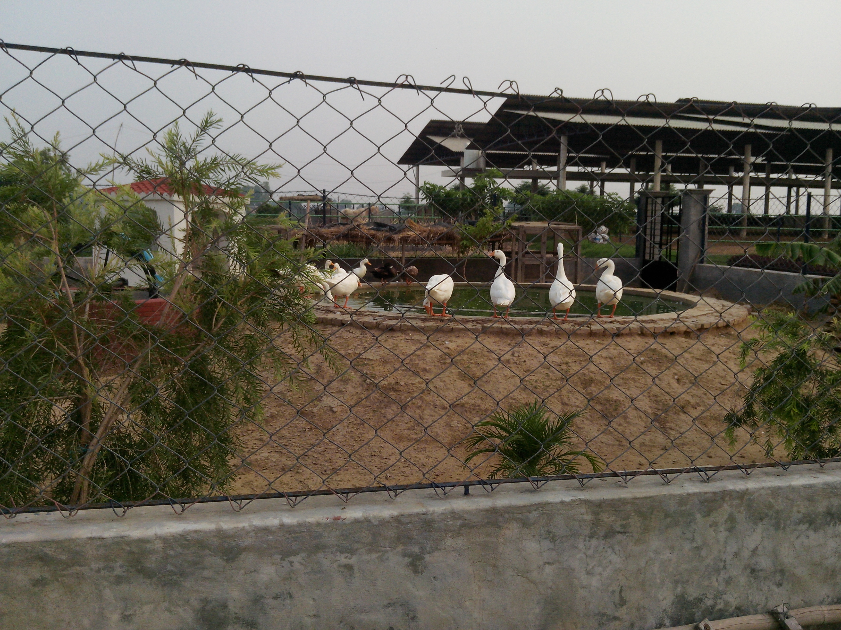 Dairy Farm in Bir Pind